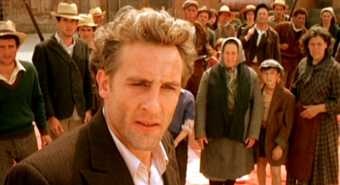 Screenshot del film Novecento (1976)